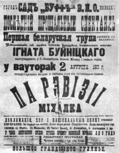 Абвестка аб спэктаклі "Па рэвізіі" (1911 г.) трупы БуйніцкагаUnknown playbill ignat buynitski's troupe